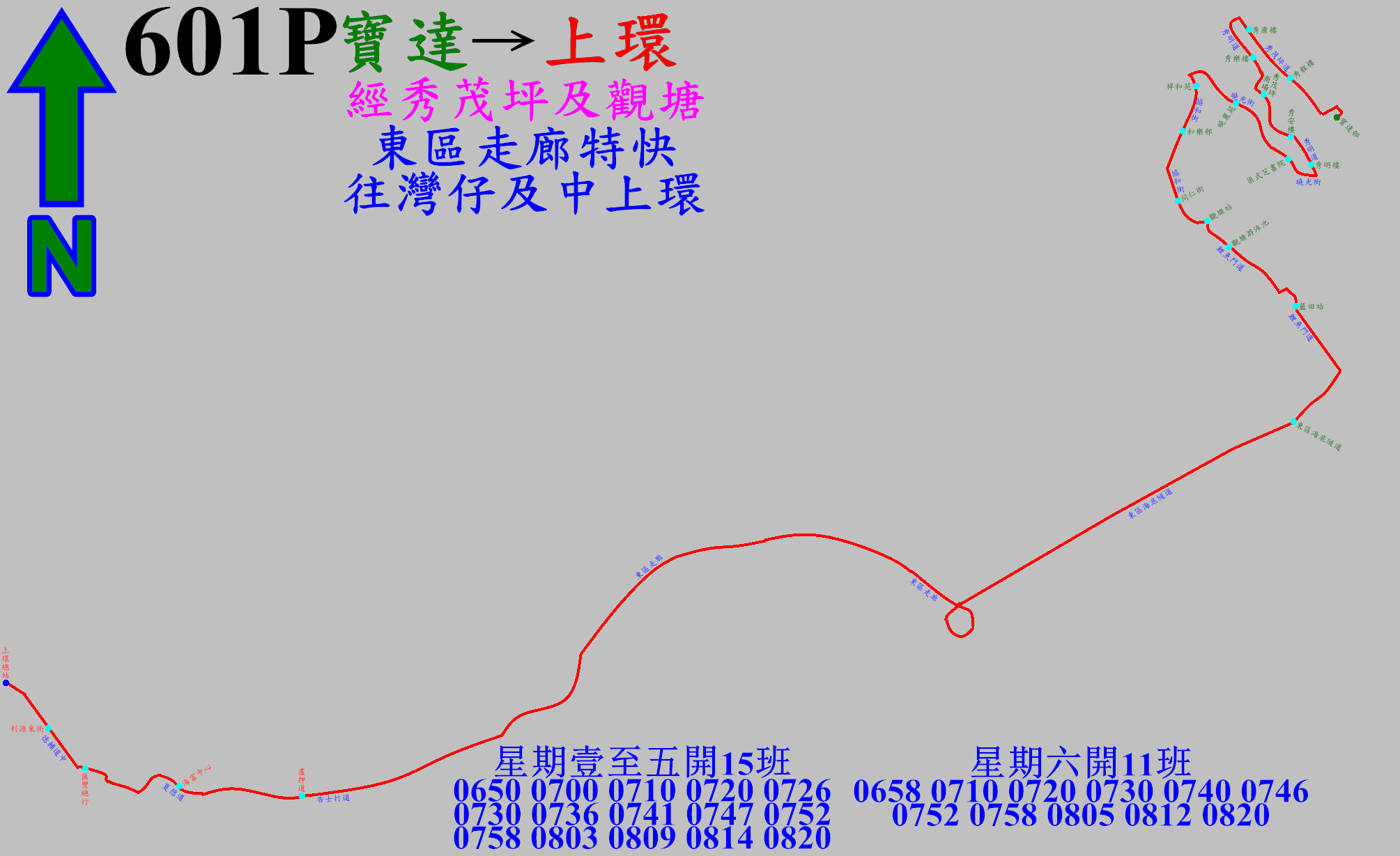 中文（香港）: 過海隧巴601P線港島方向的走線圖